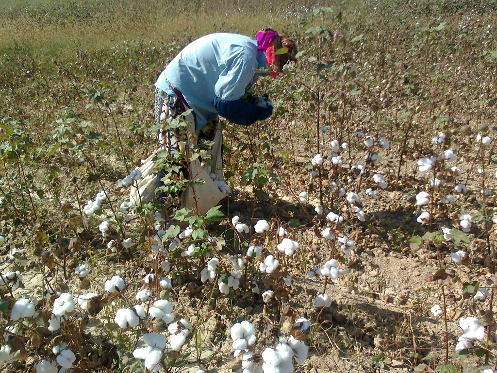 Ручной сбор хлопка (Бука, Ташкенсткий область, Узбекистан), техника сбора